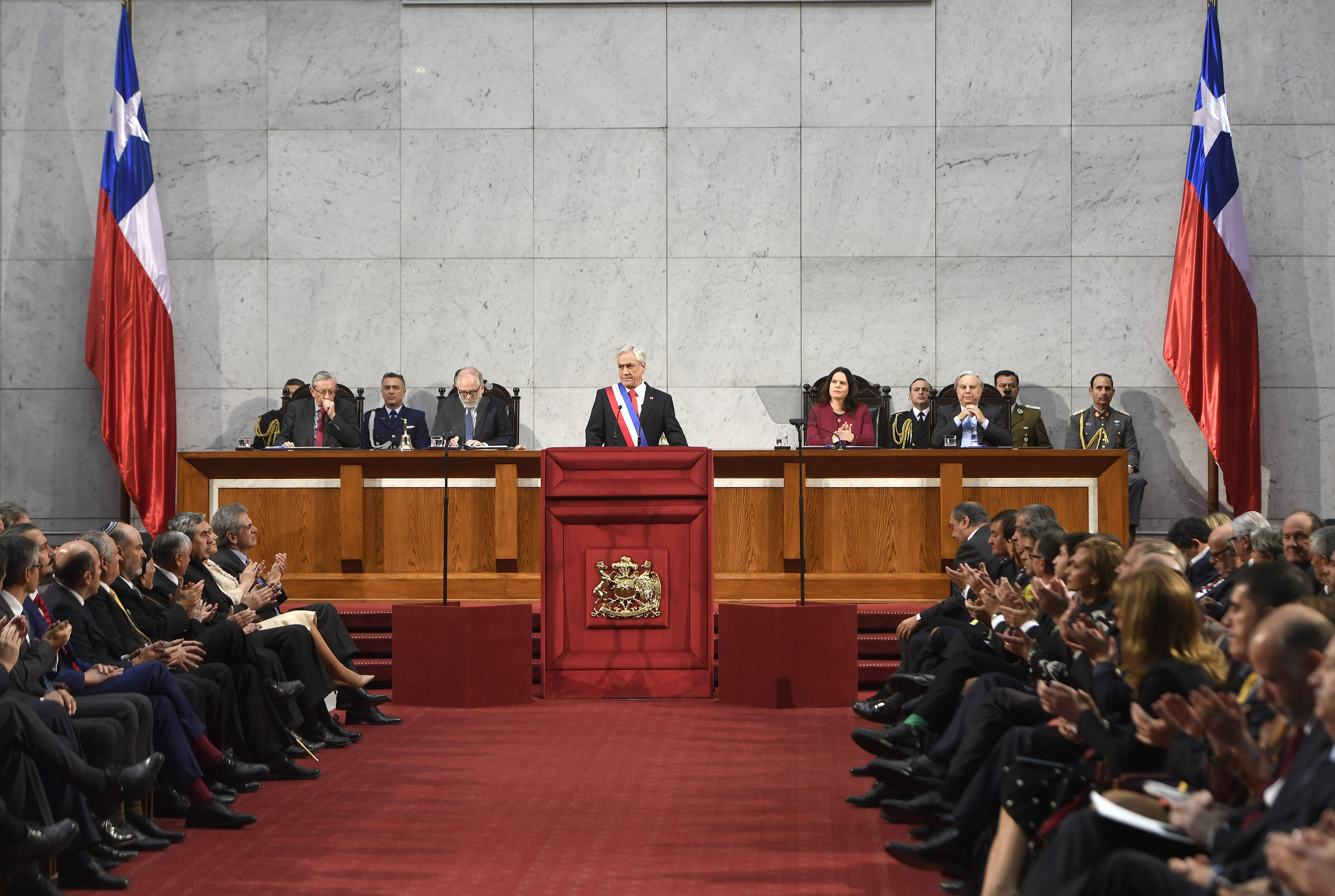 Sebastián Piñera dirigiendo al país la Cuenta Pública el 1 de junio de 2018.